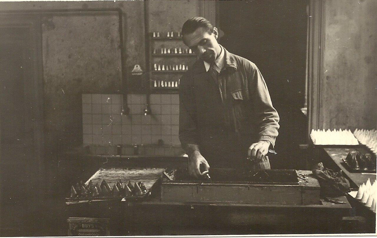 De vroegste foto van de bereiding van negerzoenen, jaren twintig. Collectie familie Buys, gidsen van Saint Louis